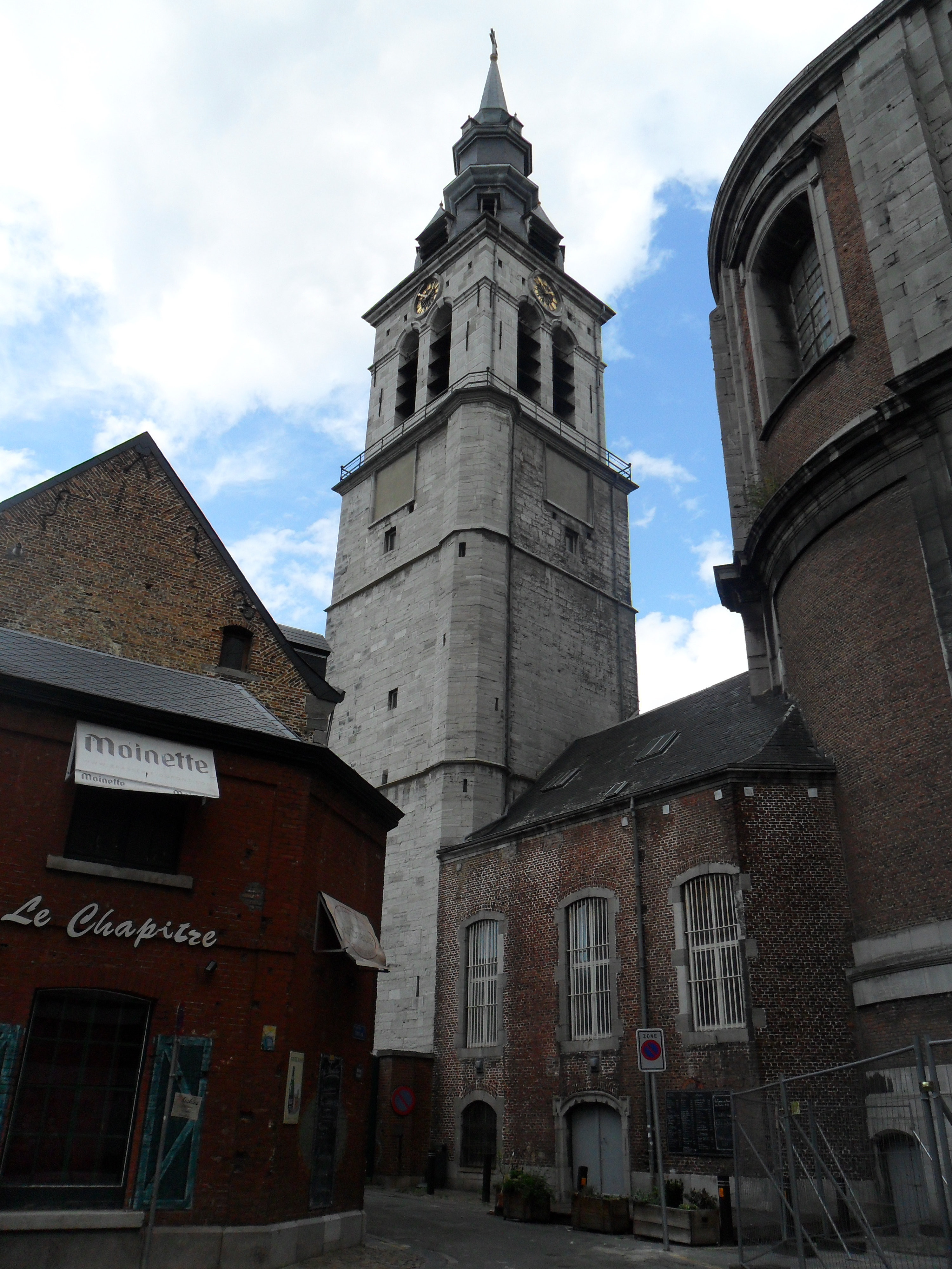 Namur